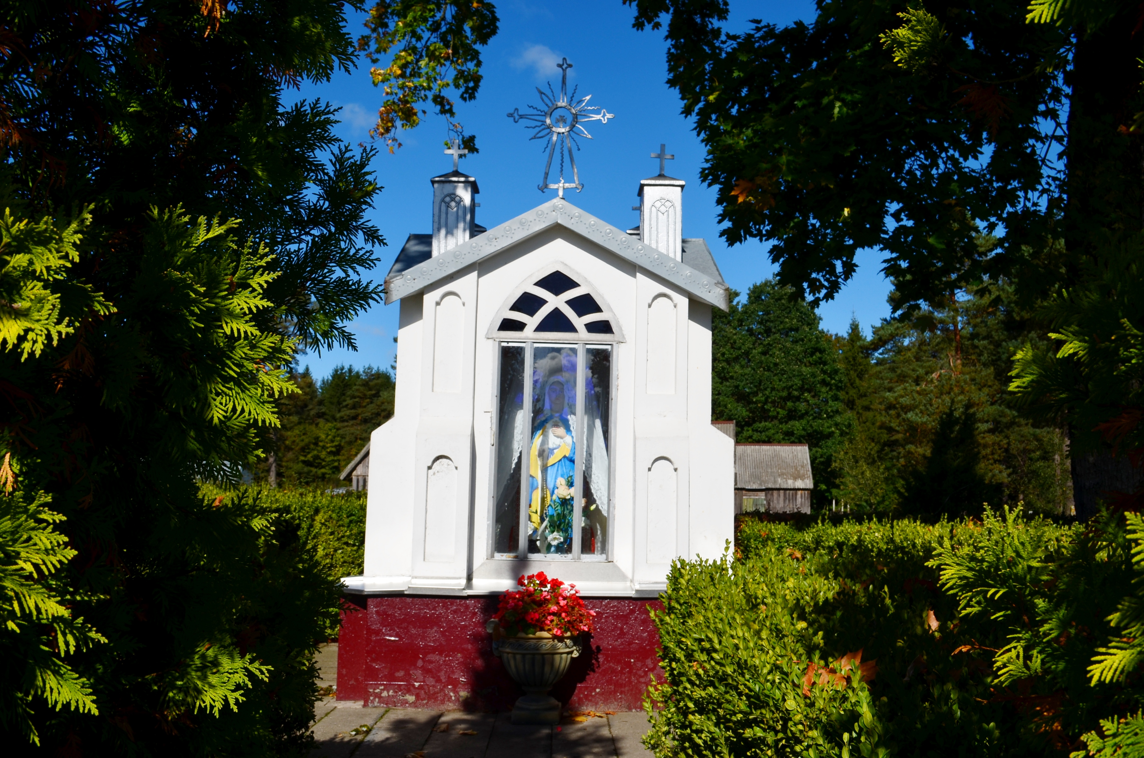 Žemaitėška: Kuoplīčielė Šėlūs, Šėlalės rajuons